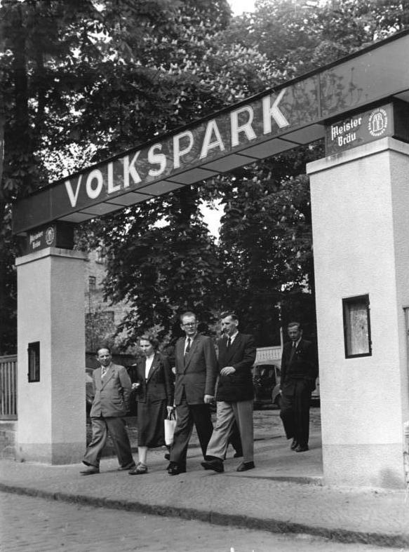 Halle, Volkspark, Eingang Zentralbild Gerbeth 28.5.1956 Zur Woche der deutsch-polnischen Freundschaft Polnische Delegation im Bezirk Halle (Saale) Die polnische Delegation besucht bei einer Stadtbesichtigung auch die traditionelle Kampfstätte der Halleschen Arbeiterschaft, den jetzt neu renovierten und ausgebauten "Volkspark". Die Mitglieder der Delegation sprachen sich sehr anerkennend über das Geschaffene aus.